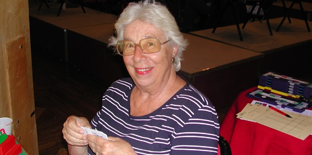 La bridgista Luciana Capodanno